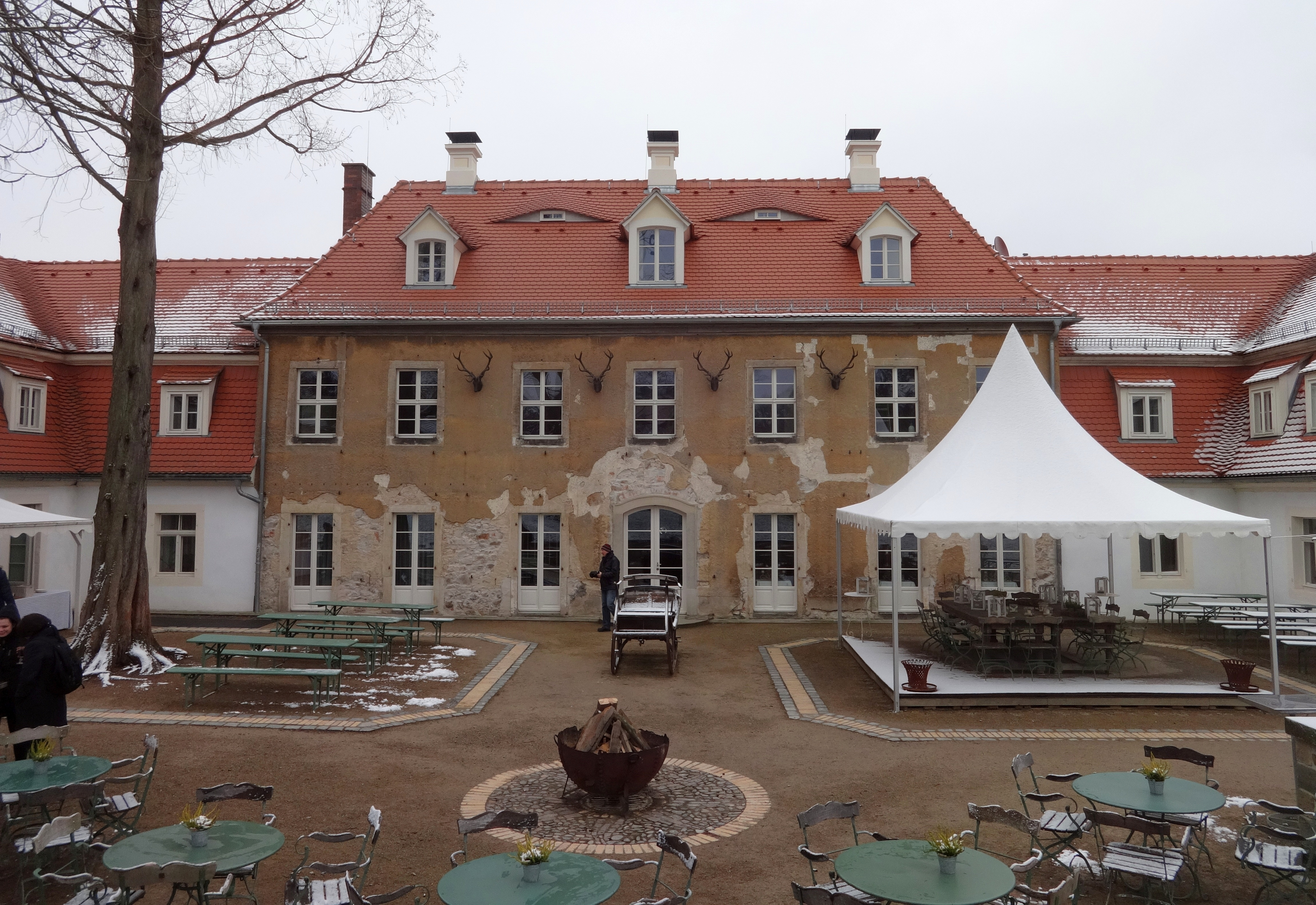 Das Marcolinihaus in Moritzburg, Blick auf den Mittelbau, den ältesten Teil des Hauses